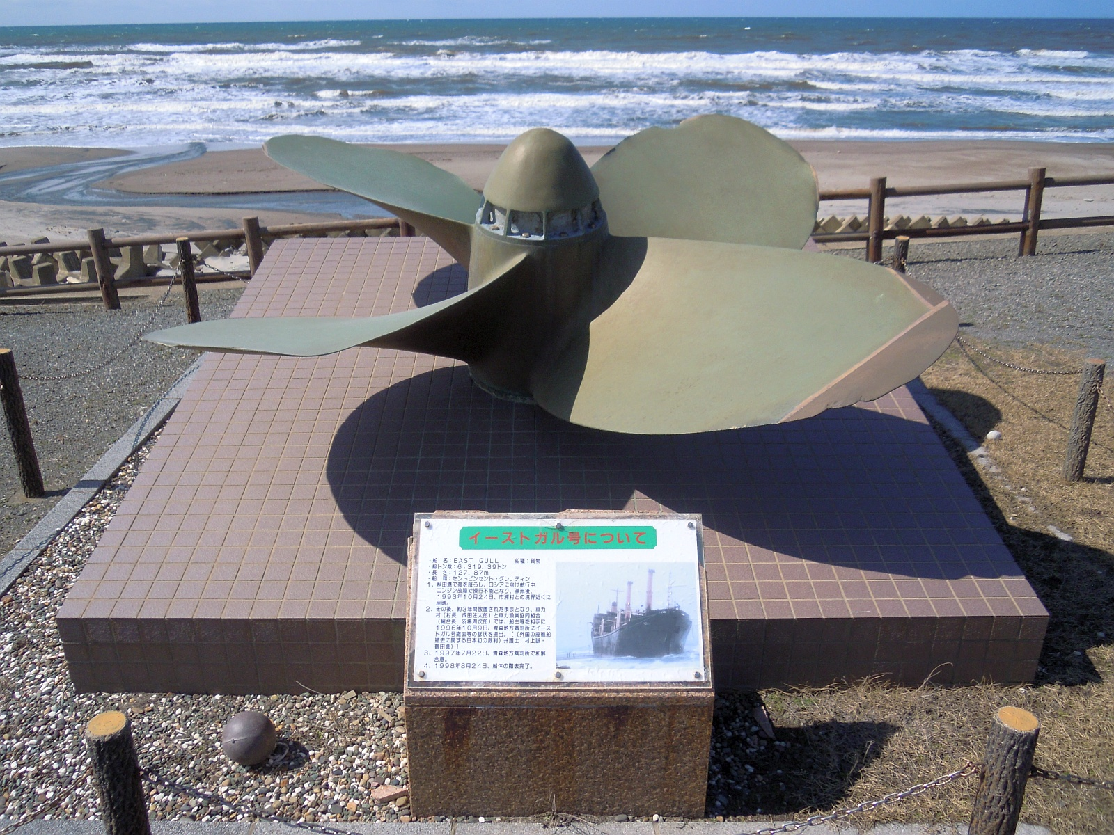 青森県つがる市のしゃりきサンセットドーム敷地内に保存展示されている貨物船「イーストガル号」のスクリュープロペラ。